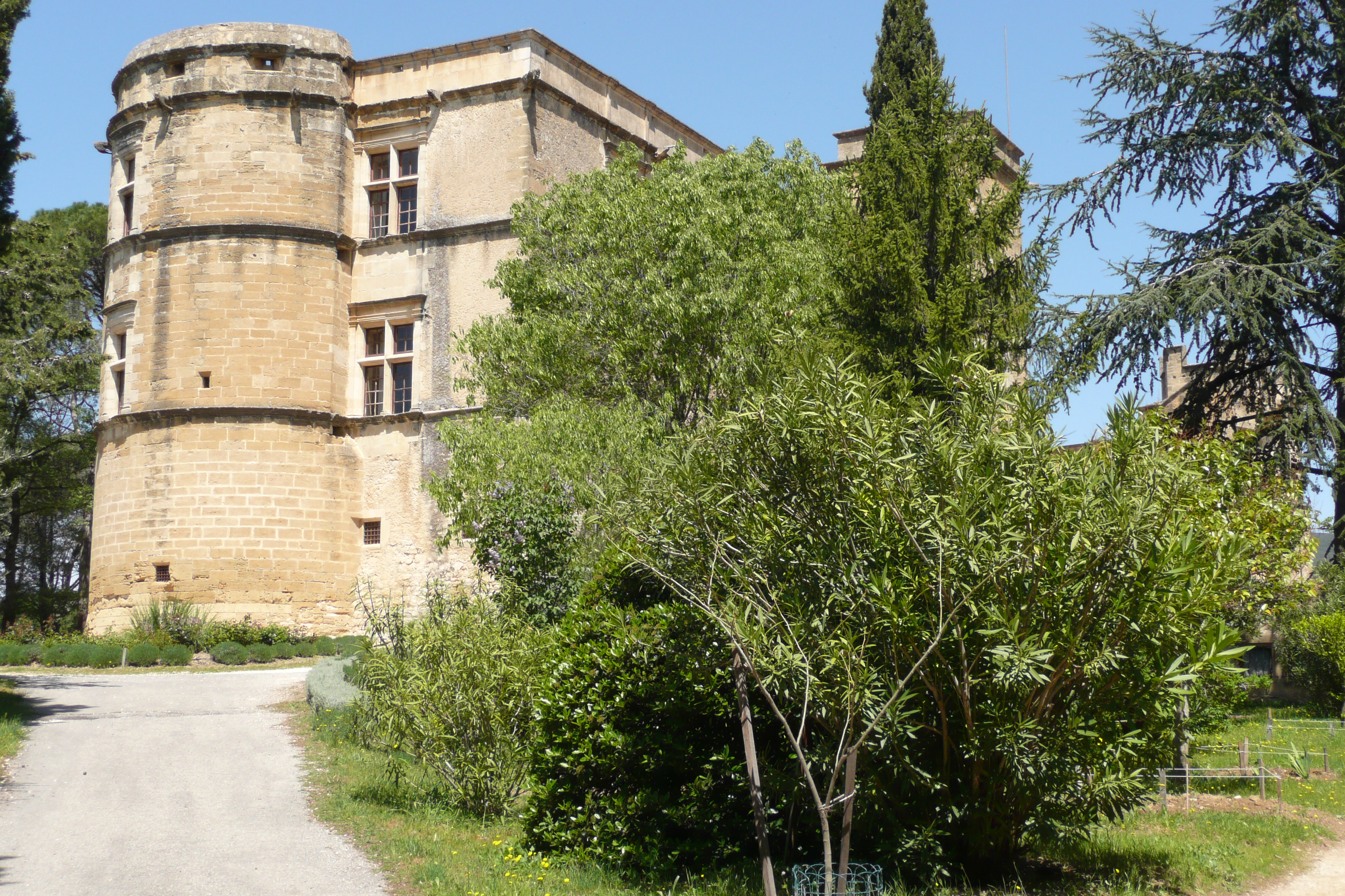 Le château renaissance à Lourmarin.